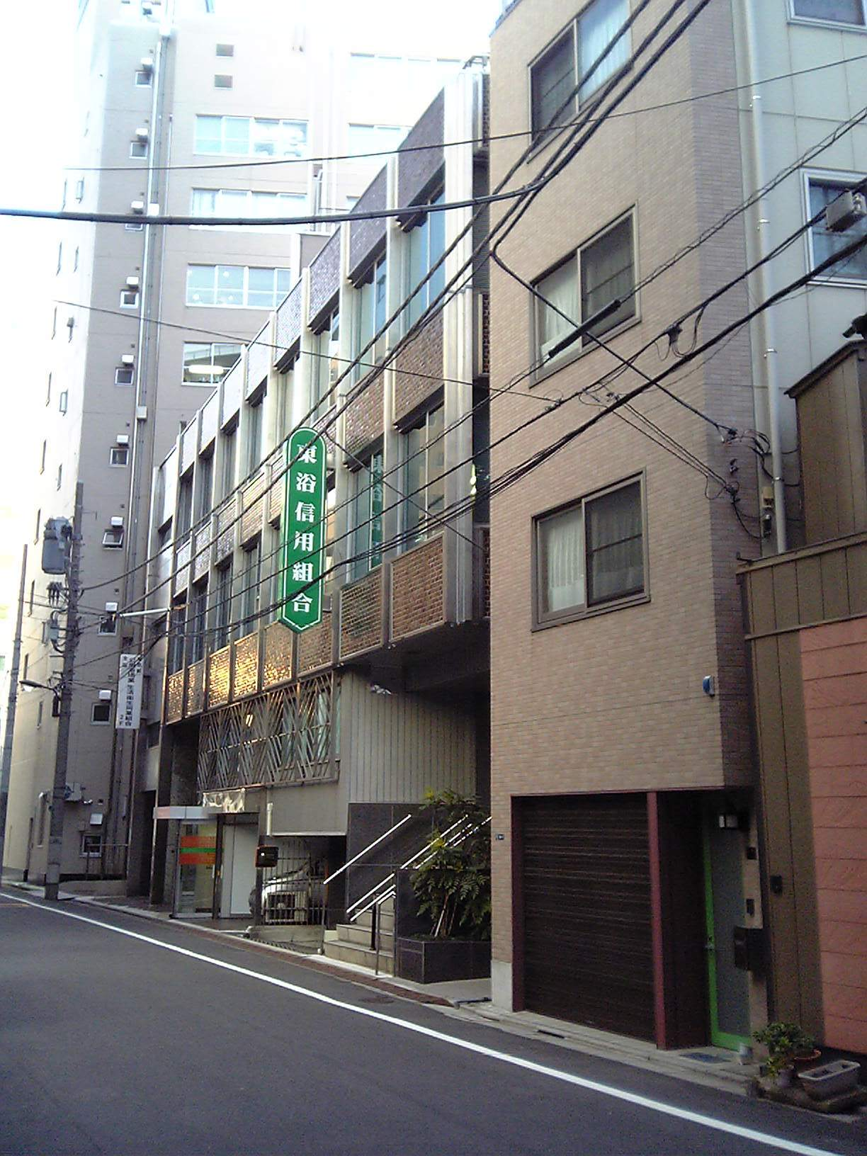 東浴信用組合本店（2009年12月14日撮影）